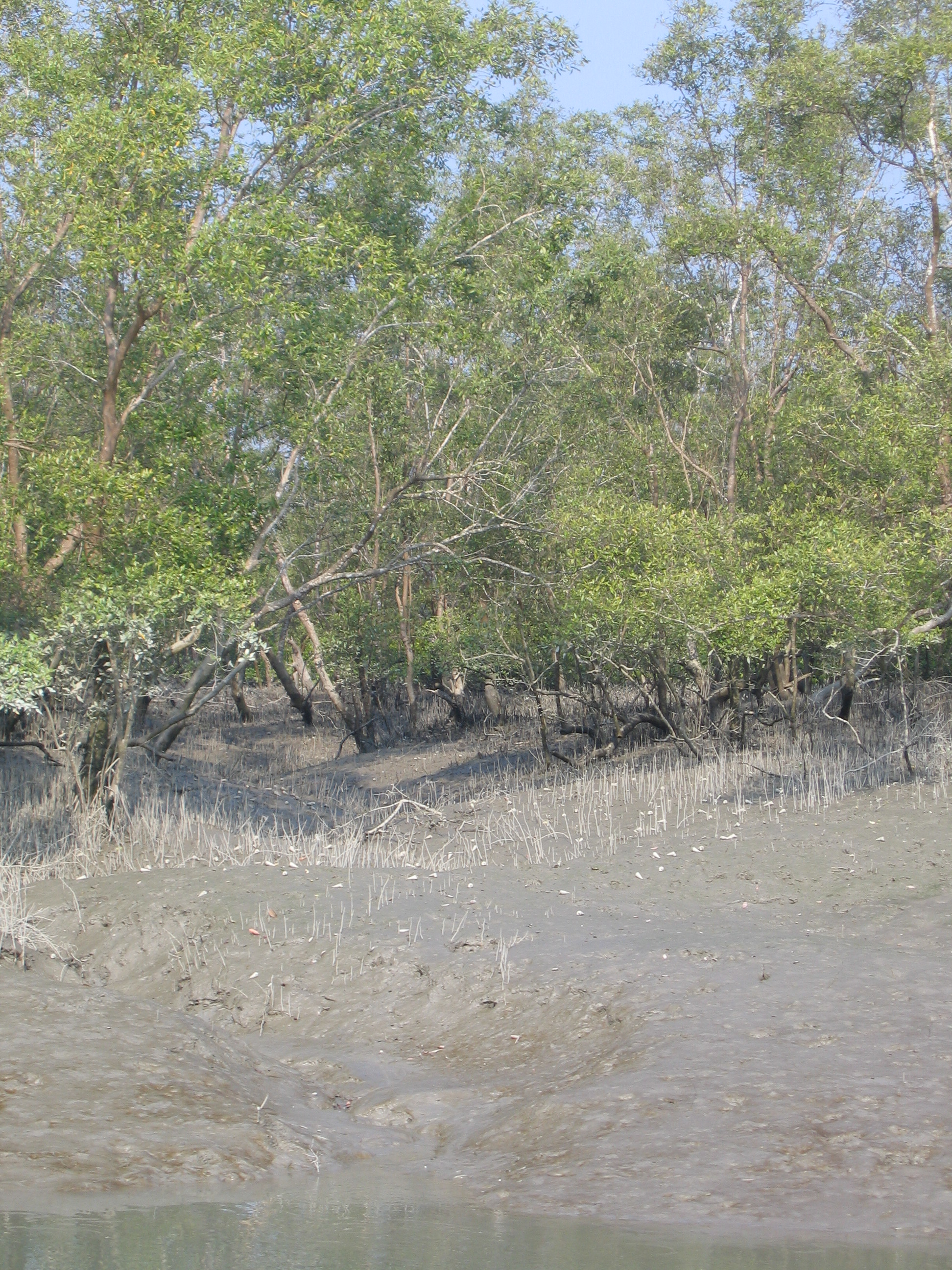 Sunderbans National Park